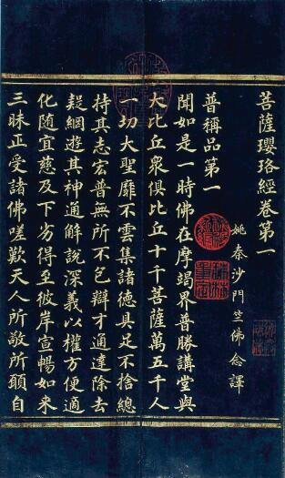 《菩萨璎珞经》，二十卷，后秦释竺佛念译，清乾隆年王杰、曹文埴、彭元瑞、金士松、沈初泥金写本。经折装，黑光蜡笺纸，泥金楷书，每半开5行15字，上下双边，藏于中国故宫博物院。